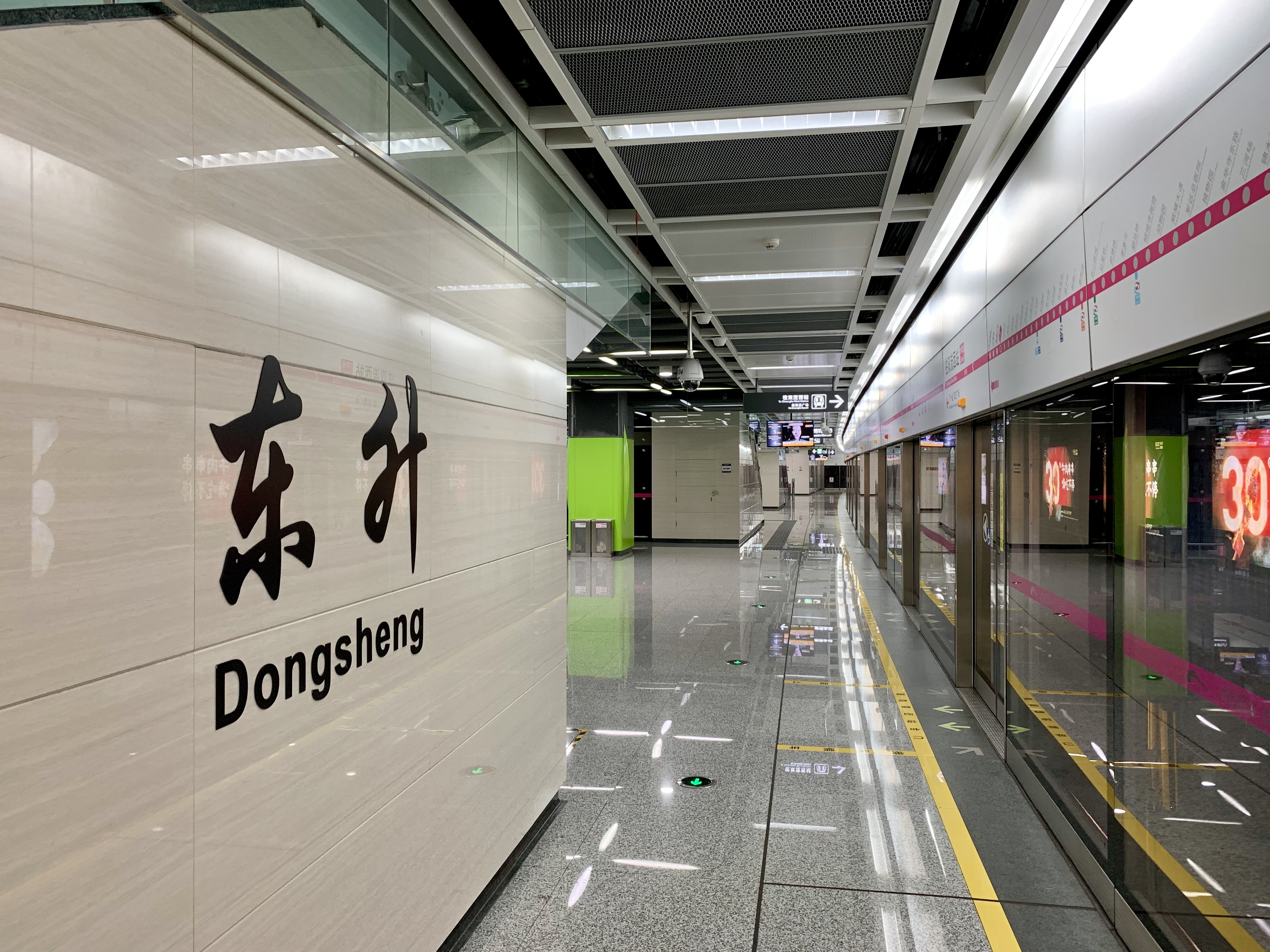 成都地铁东升站